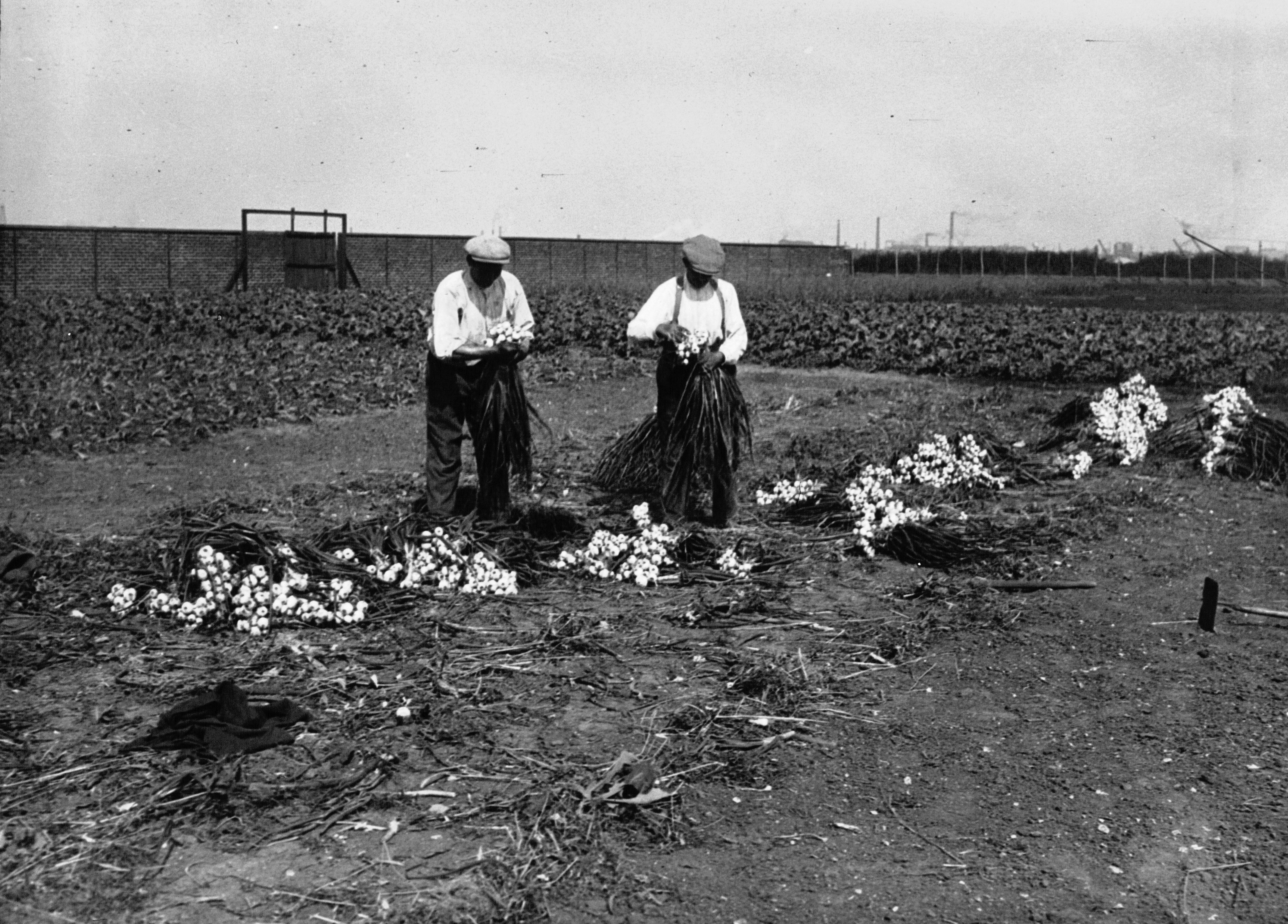 Photographie de presse